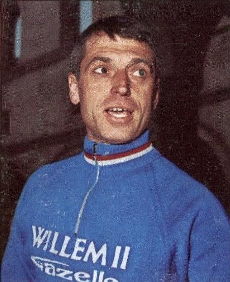 Rick Van Looy en 1968 - Campioni dello Sport, 1968-1969, n°186.